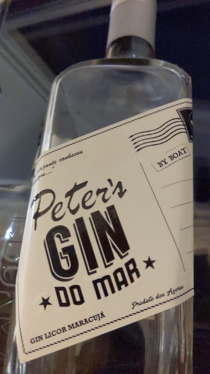 Eine leere Flasche Gin do Mar aus dem Café Peter Sport in Horta (Faial/Azoren).